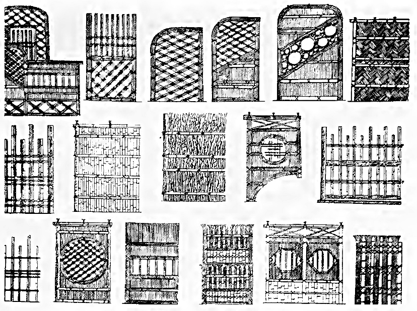 Ploty a brány v japonské zahradě, z publikace European and Japanese gardens, vydané 1902